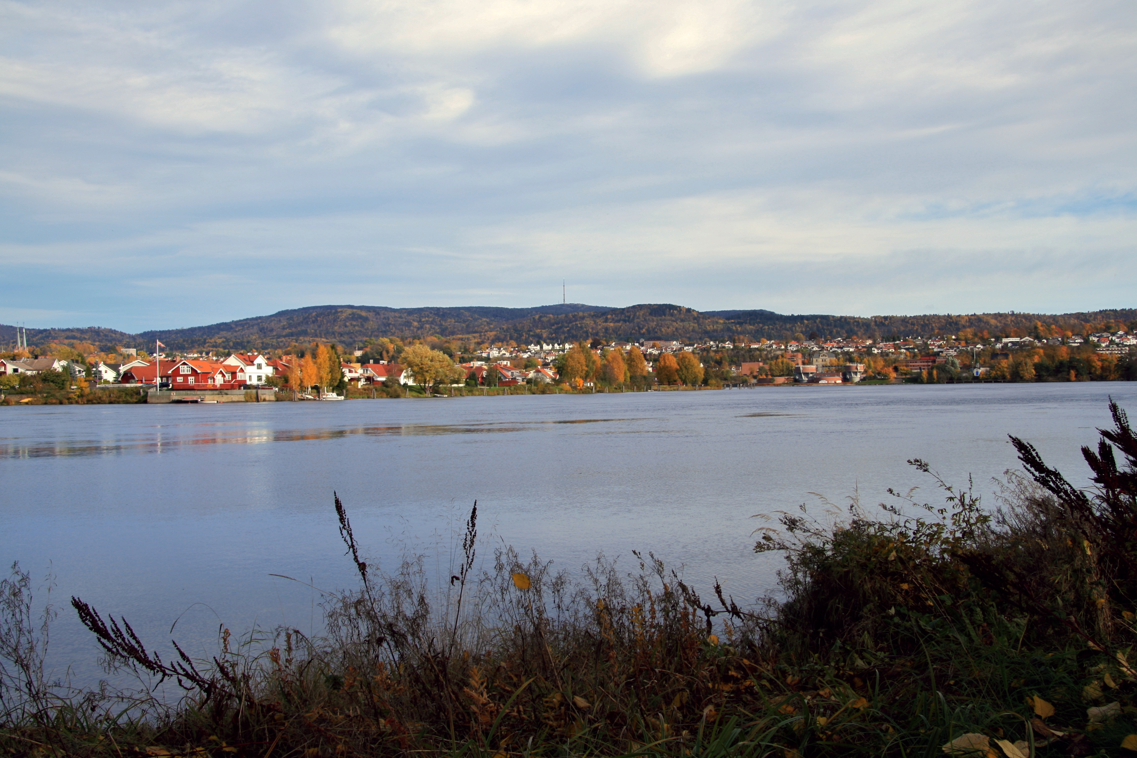 Skien frå Faret